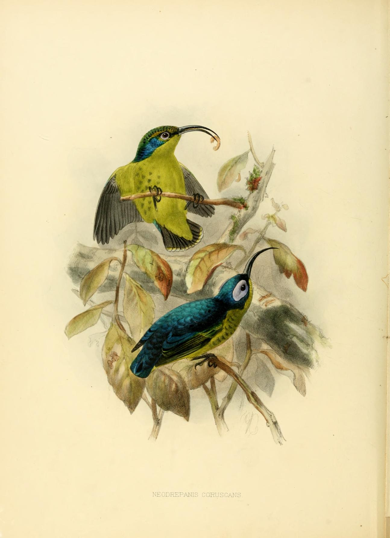 Neodrepanis coruscans (Eurylaimidae)